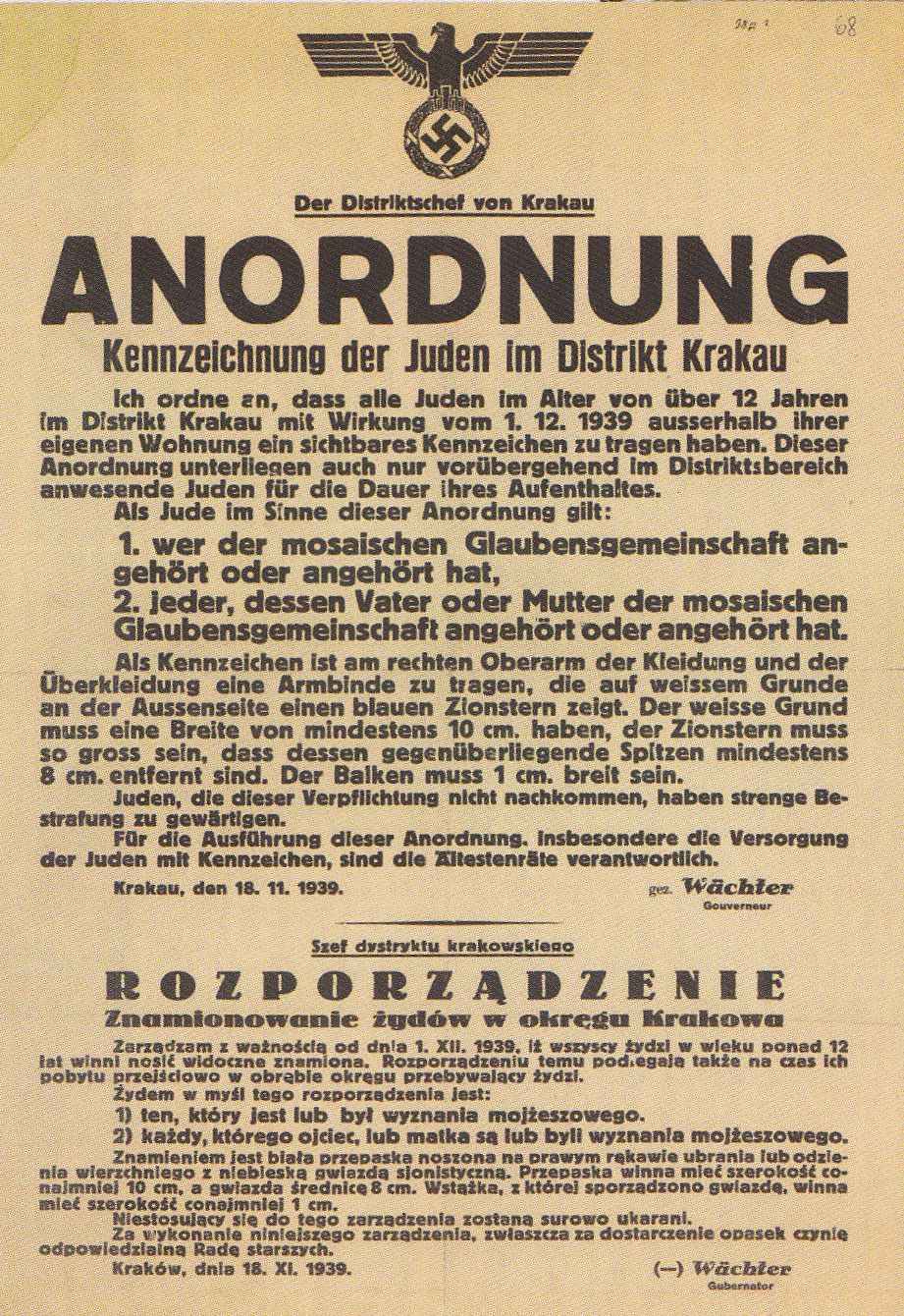 Rozporządzenie o znamionowaniu Żydów w okręgu krakowskim